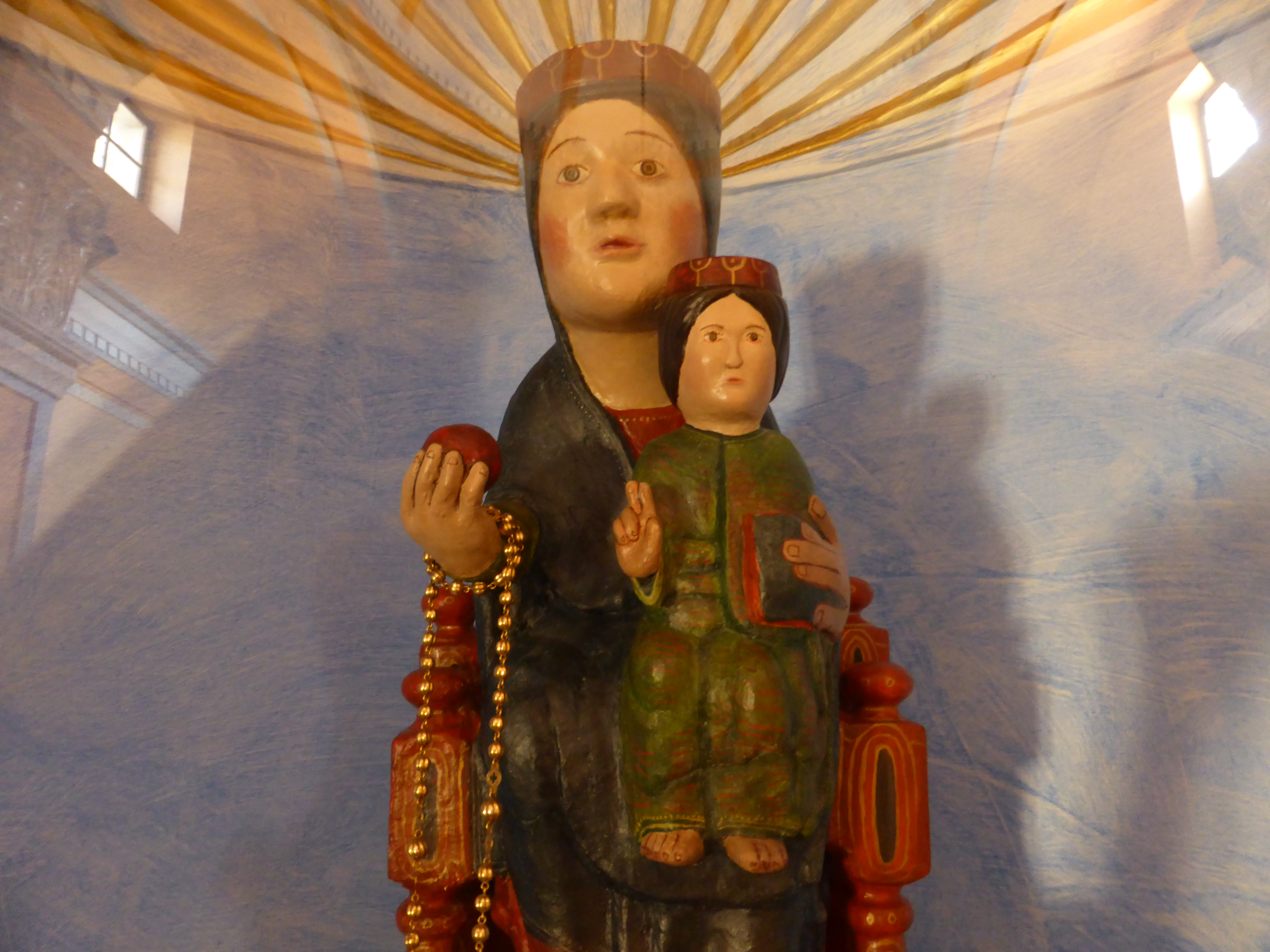 Talla policromada de la Virgen del Agua, hacia el siglo XII, pero restaurada.